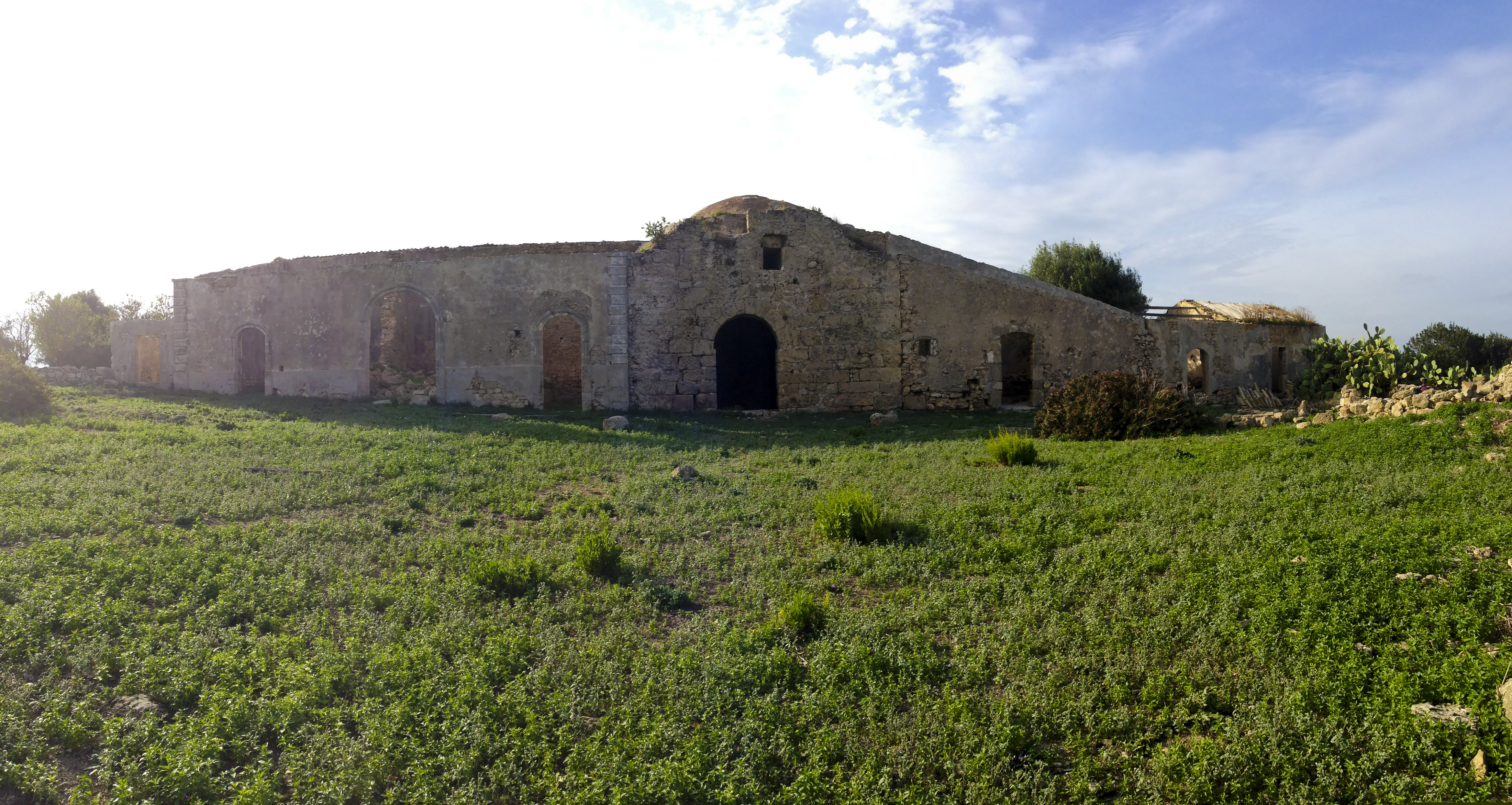 La trigona vista di fronte